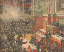 Reconstituição em pintura assinada pelo artista Derroir